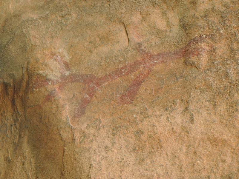 Peinture rupestre à Dapaong, Togo (2017)